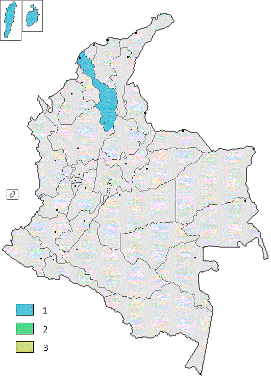 La cantidad de ediciones que se han realizado en cada departamento de los Juegos Deportivos Nacionales de Mar y Playa